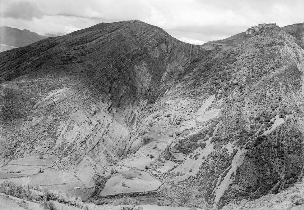 Imatge